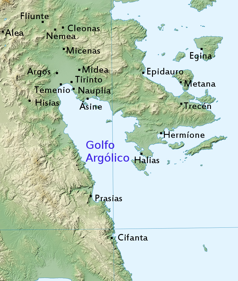 Mapa con la situación de algunas de las principales ciudades de la antigua Argólida.